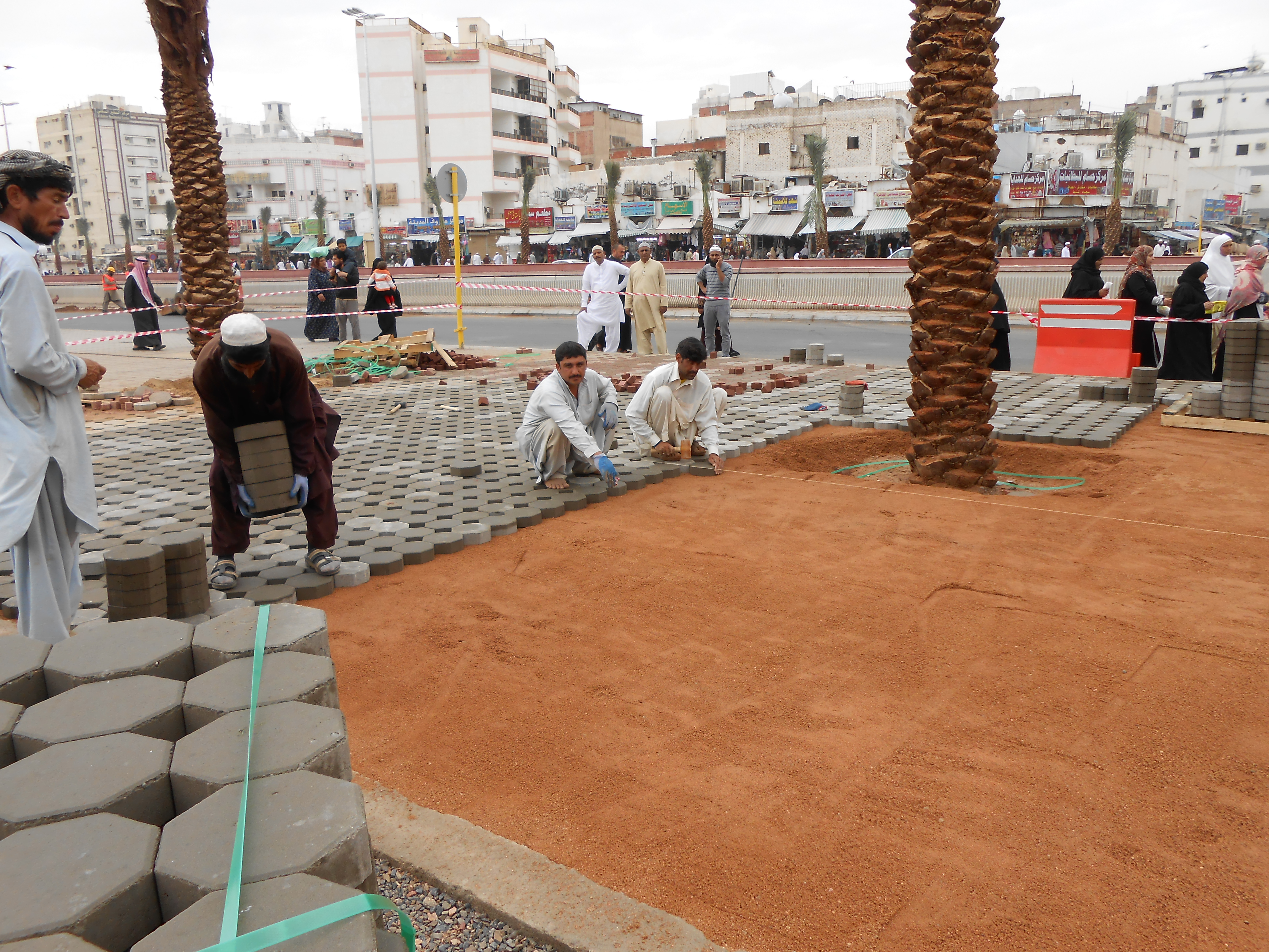 Al Masjid Nabavi Madina pakistani labor